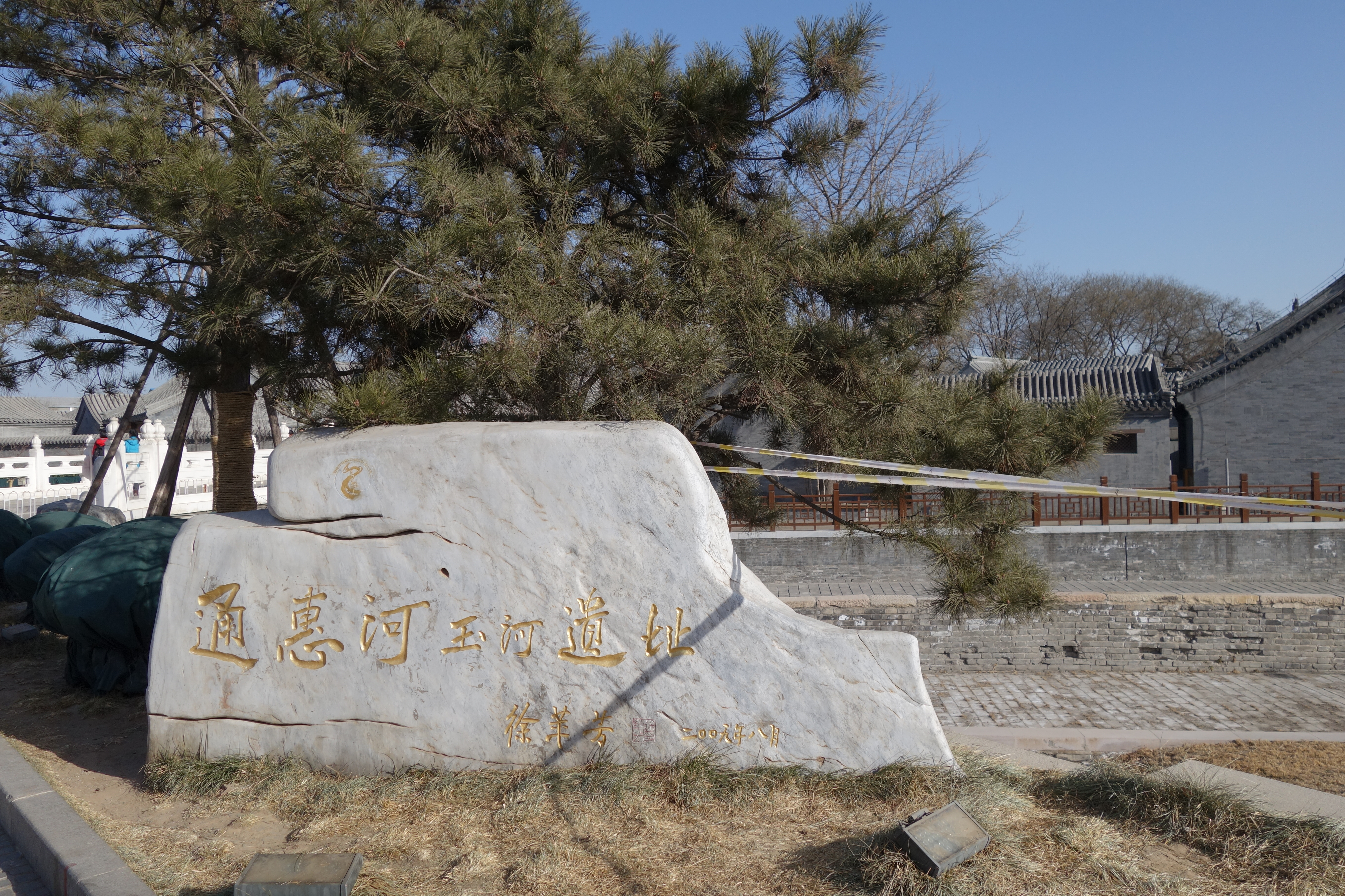 玉河故道纪念碑